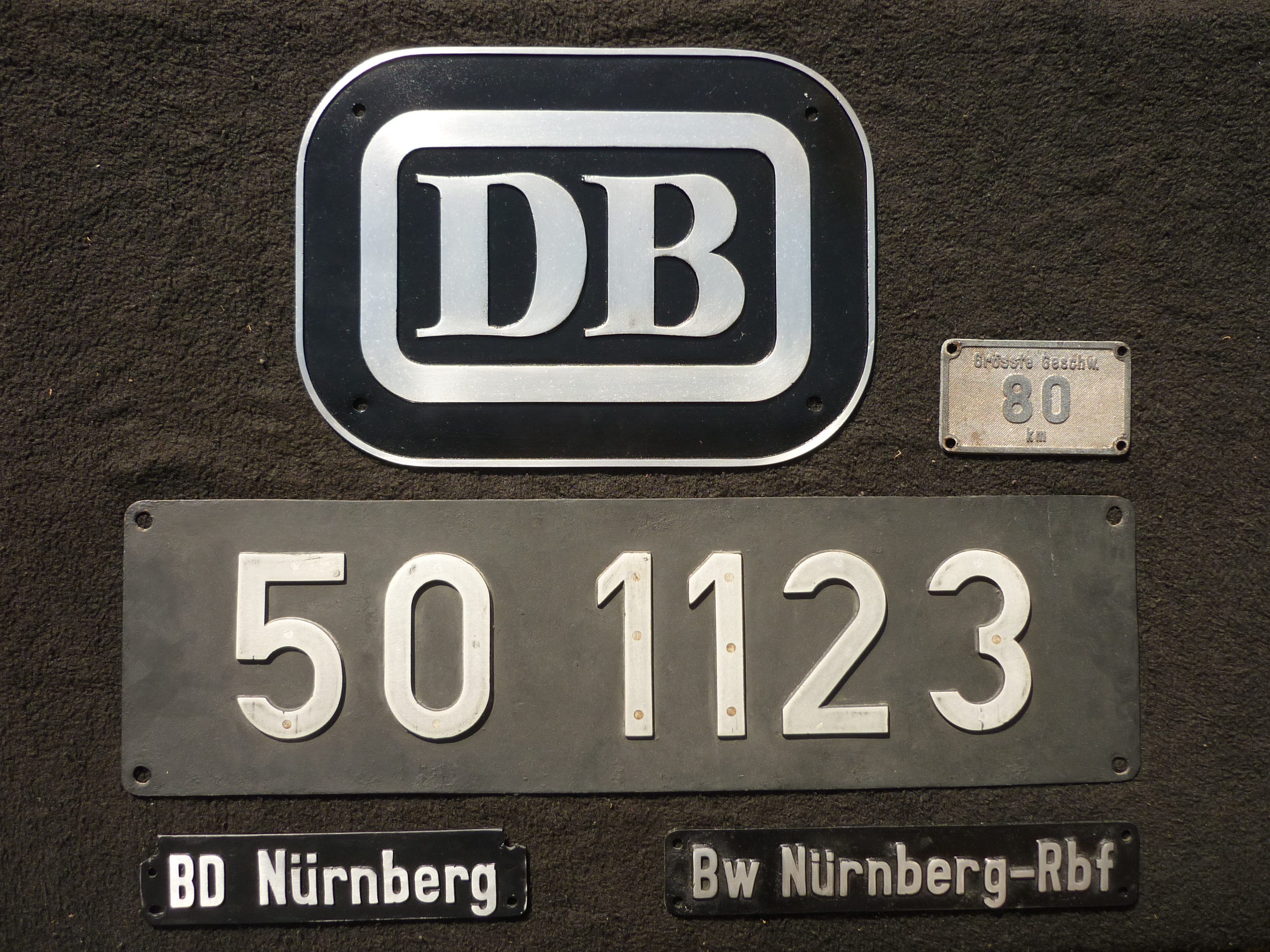 Staatsbahnschild (DB), größte zulässige Geschwindigkeit der Lok (80 Km/h), Loknummernschild (50=Loktyp, 1123=Ordnungsnummer), Bahndirektion (BD), Beheimatung im Bahnbetriebswerk (Bw).